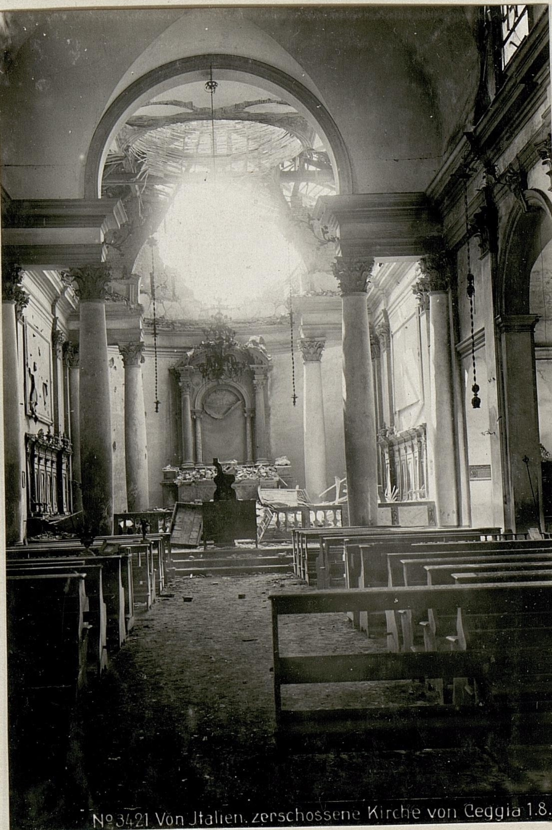 Von Italien.zerschossene Kirche von Ceggia 1.8.18.